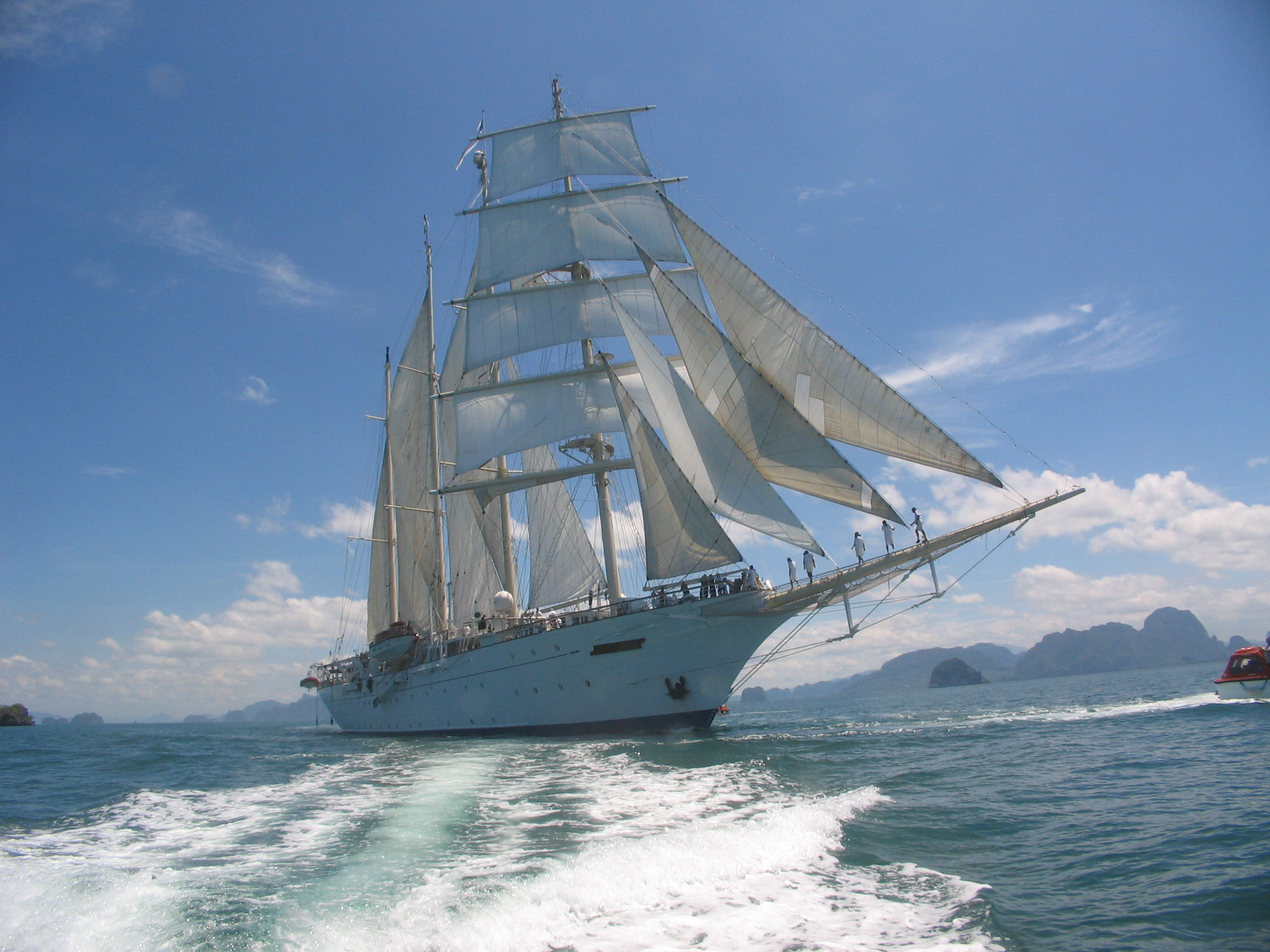 Le trois-mâts goélette Star Clipper voilier privé de croisière